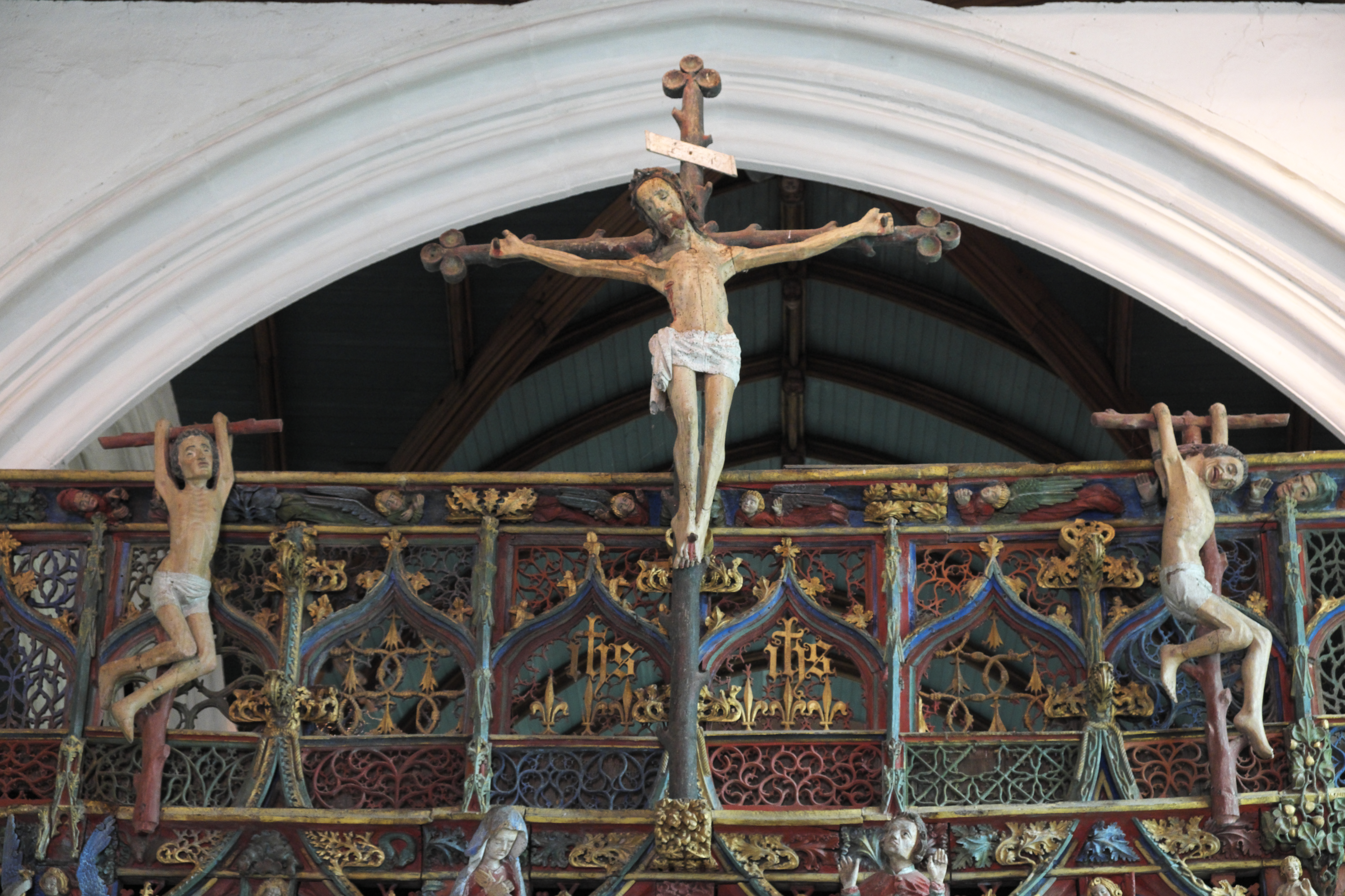 Kapelle Saint-Fiacre in Le Faouët im Département Morbihan (Region Bretagne/Frankreich), Lettner